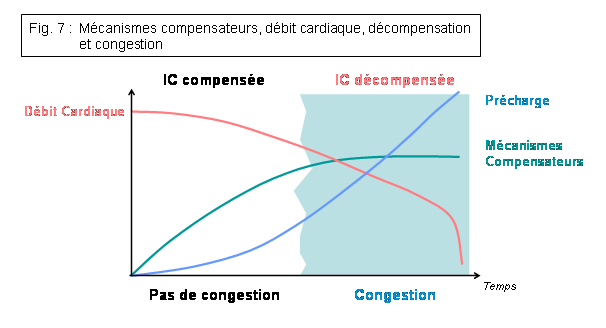 Décompensation de l'IC